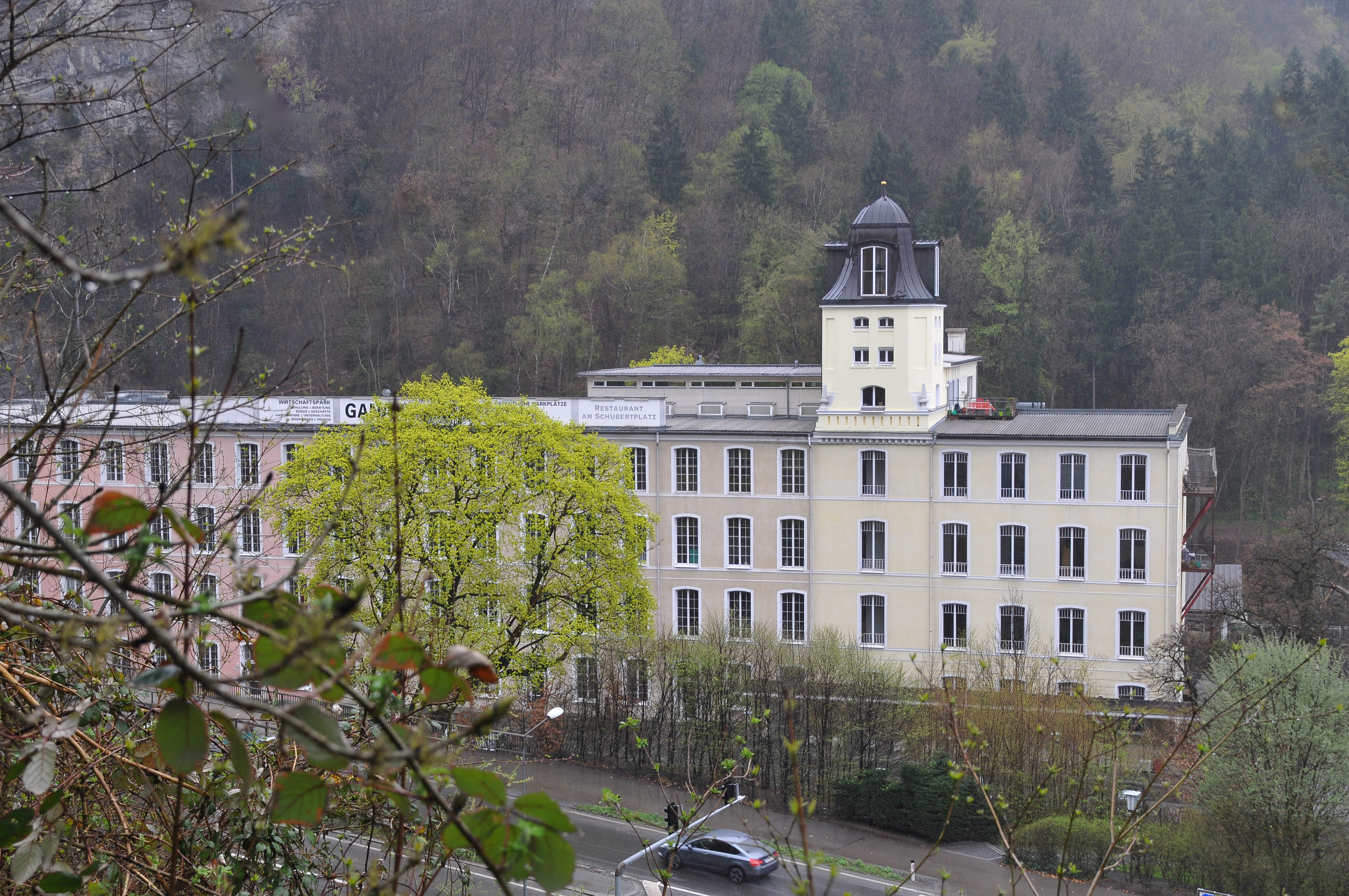 Textilfabrik Ganahl /ehem. k.k. Hoflieferant Schubertplatz Nr.2,4,5, in Feldkirch.